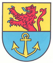 Wappen von Elzweiler